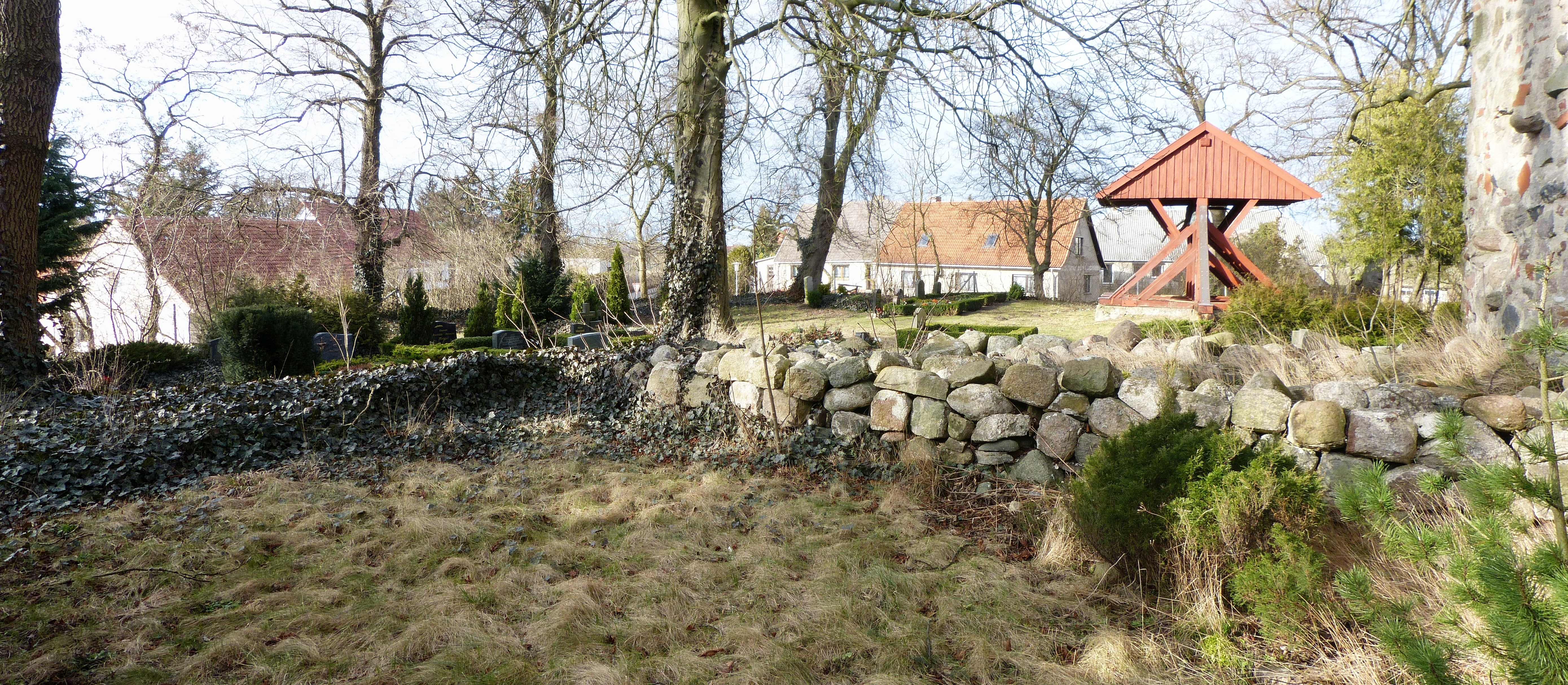 Kirche in Hohenmocker, Reste des Turmunterbaus, nördlicher Teil, im Hintergrund der Glockenstuhl